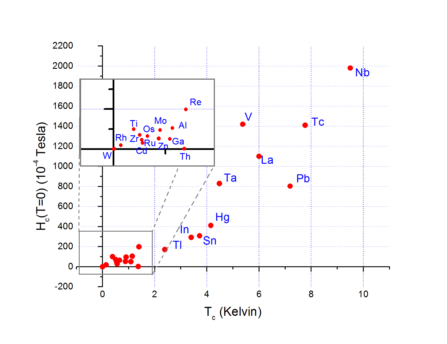 Gráfica que representa la temperatura crítica frente al campo magnético crítico de veinticuatro superconductores de baja temperatura, empleando datos de Kittel, Charles (1996) Wiley , ed. Introduction to Solid State Physics (7th ed.), pp. capítulo 12 (datos tomados a través de Dr. Rod Nave. Superconductivity Transition Temperatures and Critical Fields., accedido el 19 de mayo de 2008). Obsérvese la correlación entre ambas medidas.